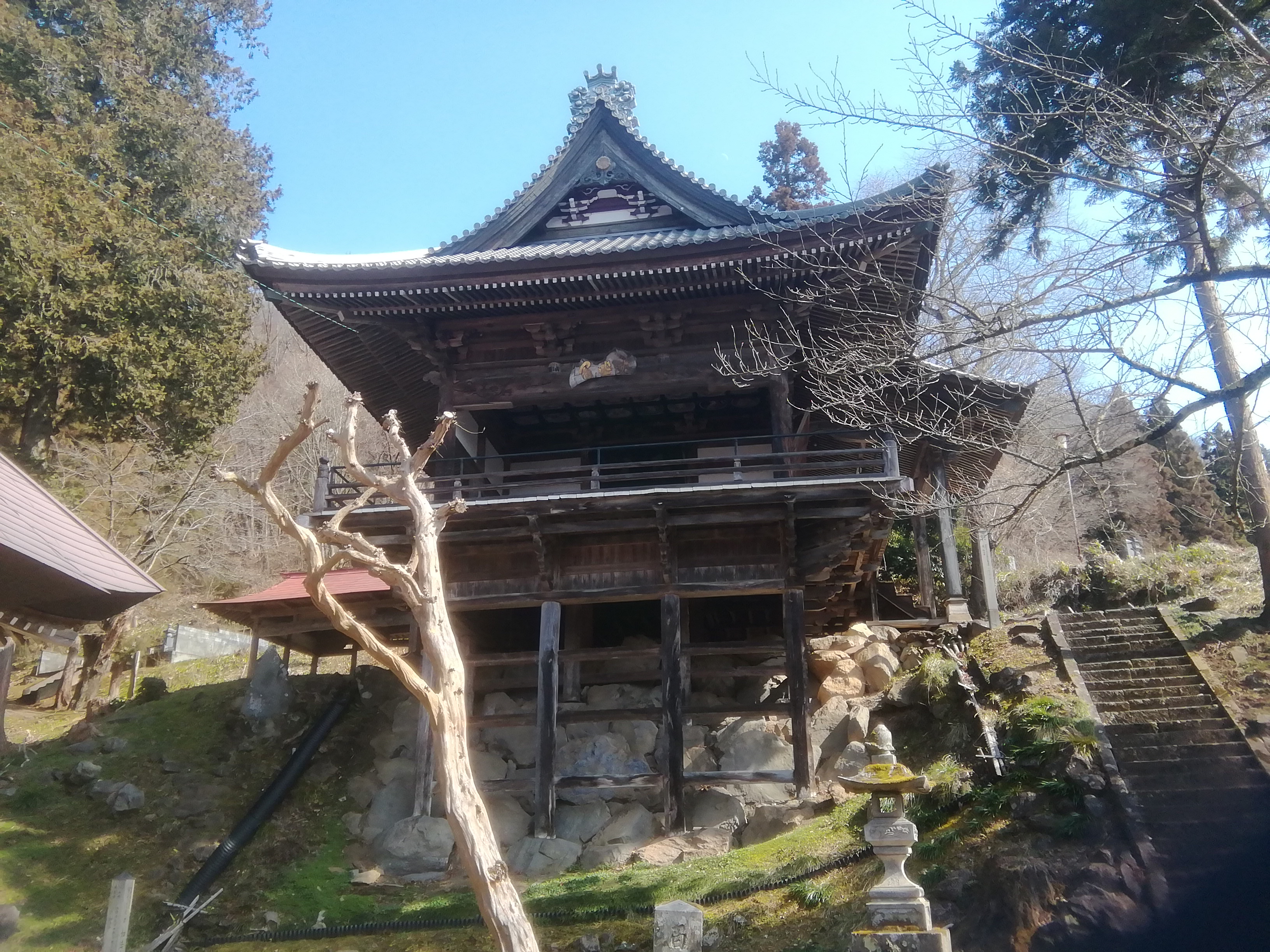 如法寺大悲閣観音堂